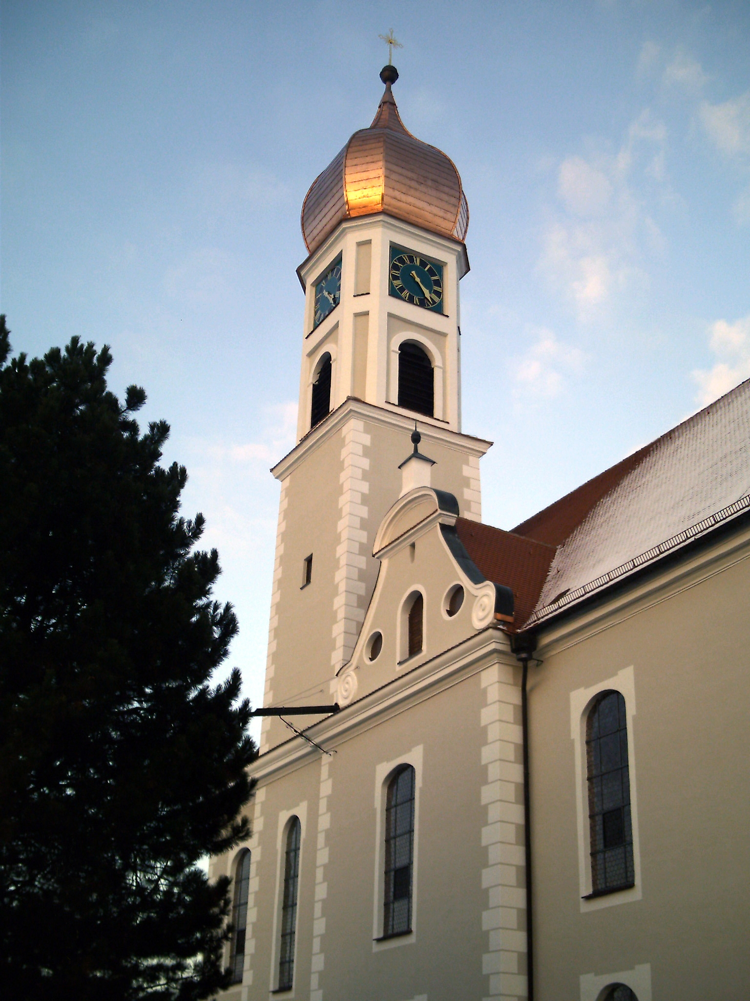 Röm.-kath. Pfarrkirche St. Martin in Tannheim (Württemberg), Kirchturm Frühbarock (erb. 1701), kurz nach der Erneuerung des Turms, Zwiebel frisch mit Kupfer ummantelt.